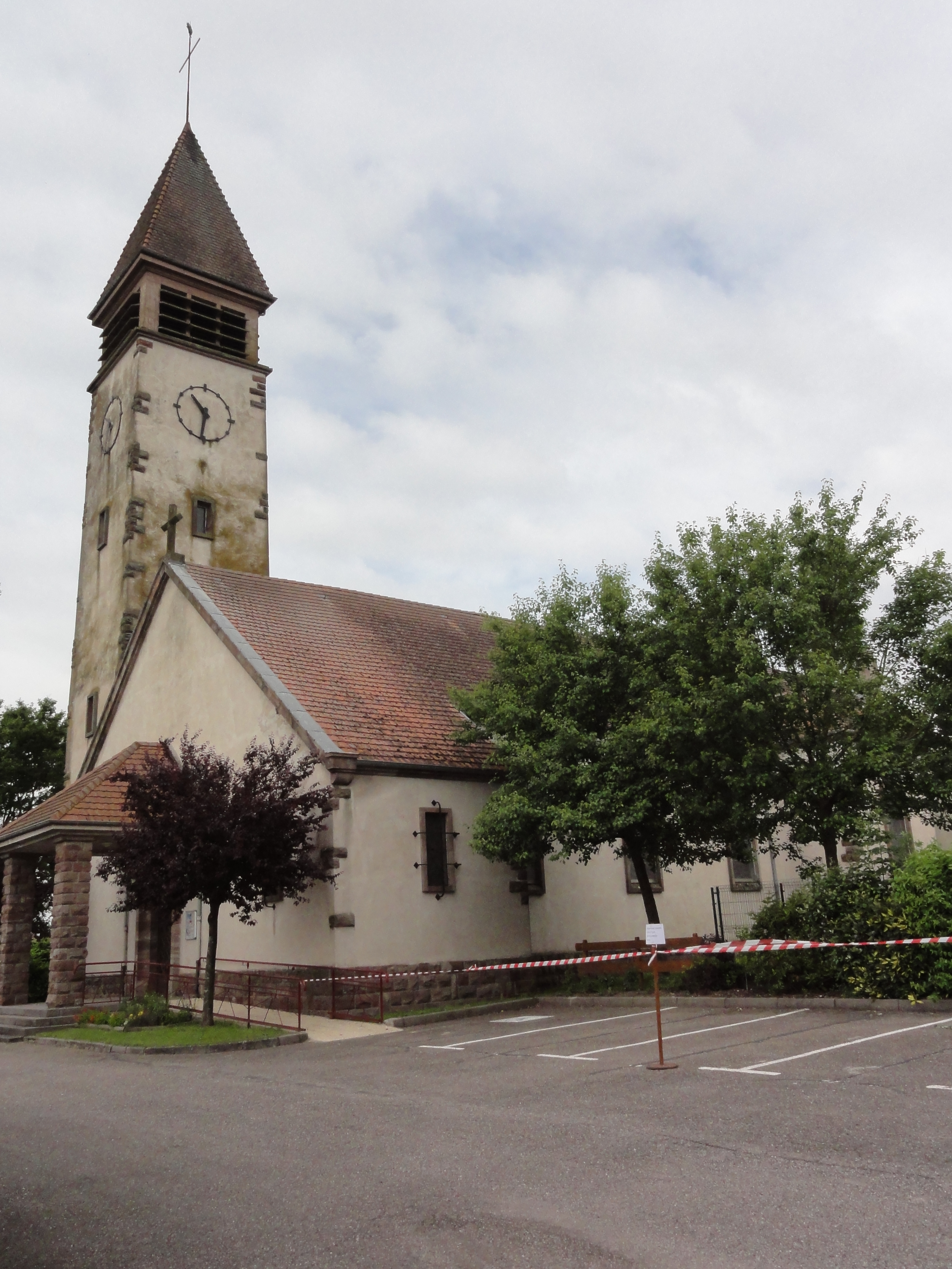 Emberménil (M-et-M) église (partiellement nettoyée)